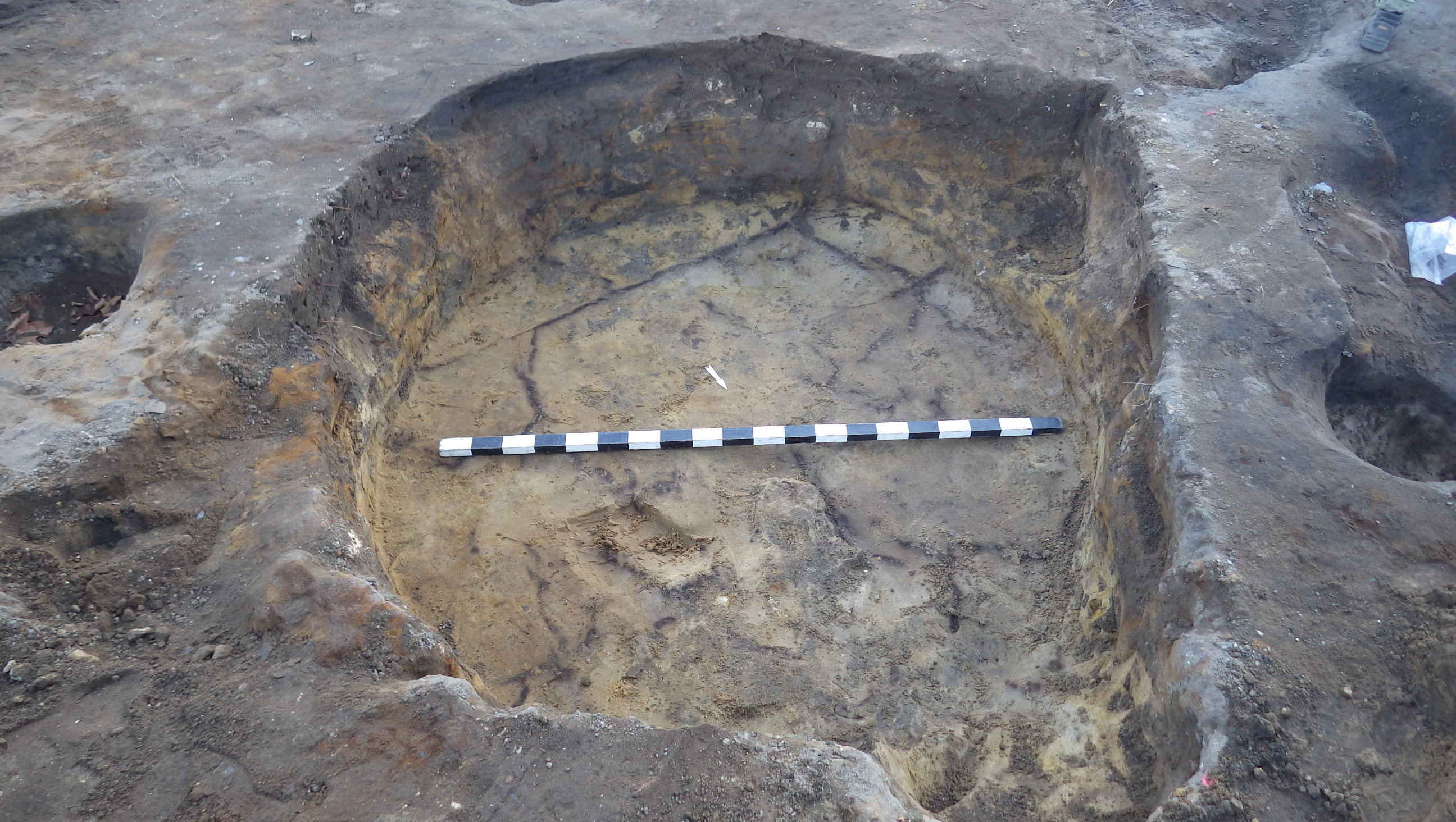 Vestiges de silo à grains médiéval creusé dans la tour de l'ancien château des Captaux de Buch, fouille de sauvetage novembre 2015 (carreau du marché de La Teste-de-Buch, DRAC-Ph. Jacques).